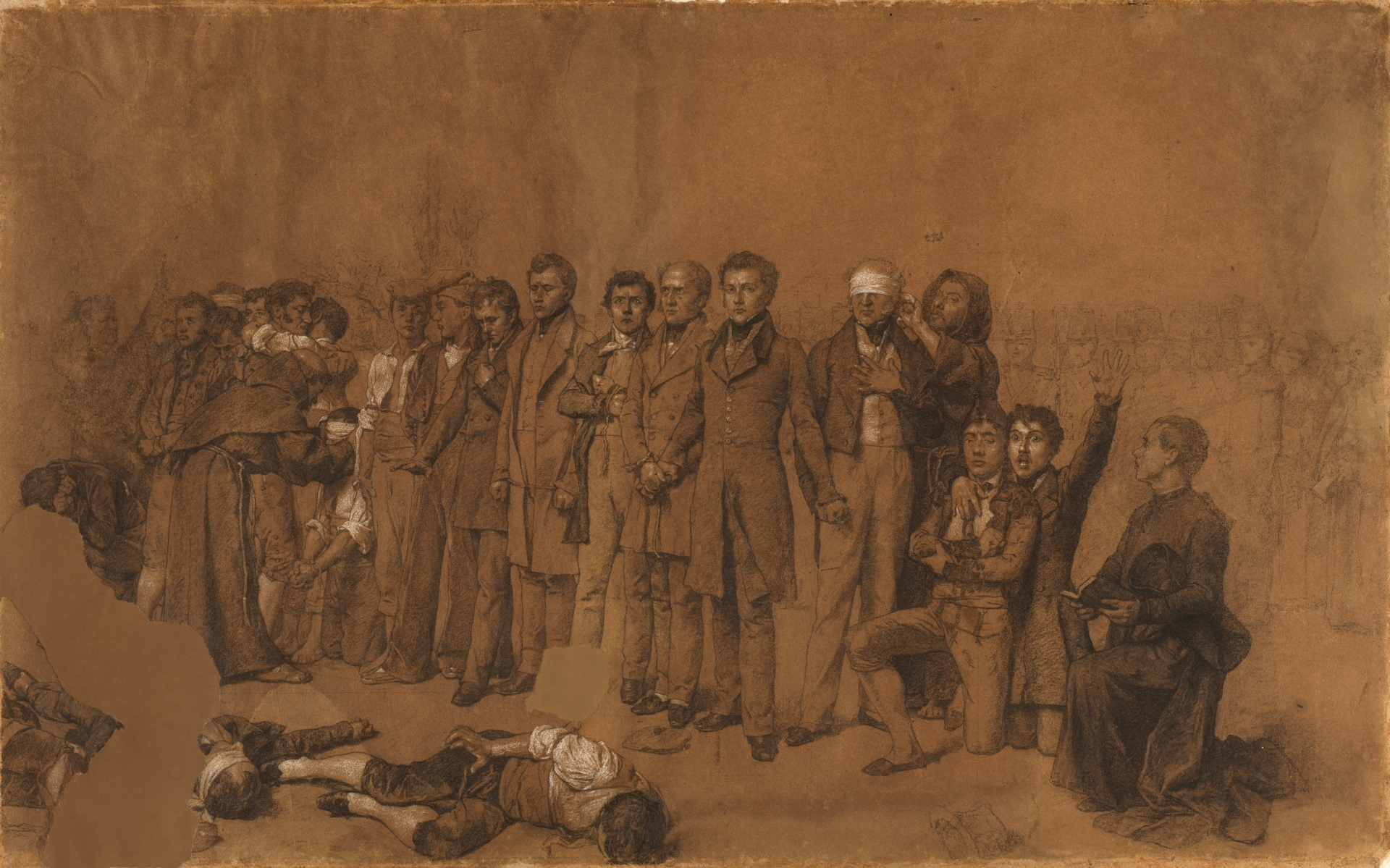 El dibujo representa el fusilamiento del general Torrijos y sus compañeros en las playas de Málaga. El general José María de Torrijos y Uriarte (1791-1831) que llegó a ser capitán general de Valencia, mariscal de campo y ministro de la Guerra durante el Trienio Liberal (1820-1823). Tras la vuelta al absolutismo, se sublevó y fue víctima de una emboscada preparada por el gobernador de Málaga, Vicente González Moreno, quien le había asegurado el triunfo de la rebelión. El día 11 de diciembre de 1831, a las once y media de la mañana, y sin juicio previo, el general Torrijos y 48 de sus compañeros fueron fusilados en las playas de Málaga. Está considerada una obra maestra de la pintura histórica del siglo XIX español y fue encargada en 1886 directamente por el Gobierno liberal de Práxedes Mateo Sagasta (1825-1903), durante la regencia de la reina María Cristina de Austria, como ejemplo de la defensa de las libertades para las futuras generaciones.